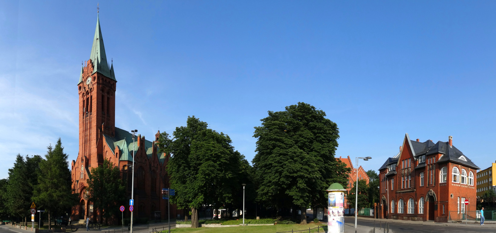 Plac Kościeleckich w Bydgoszczy